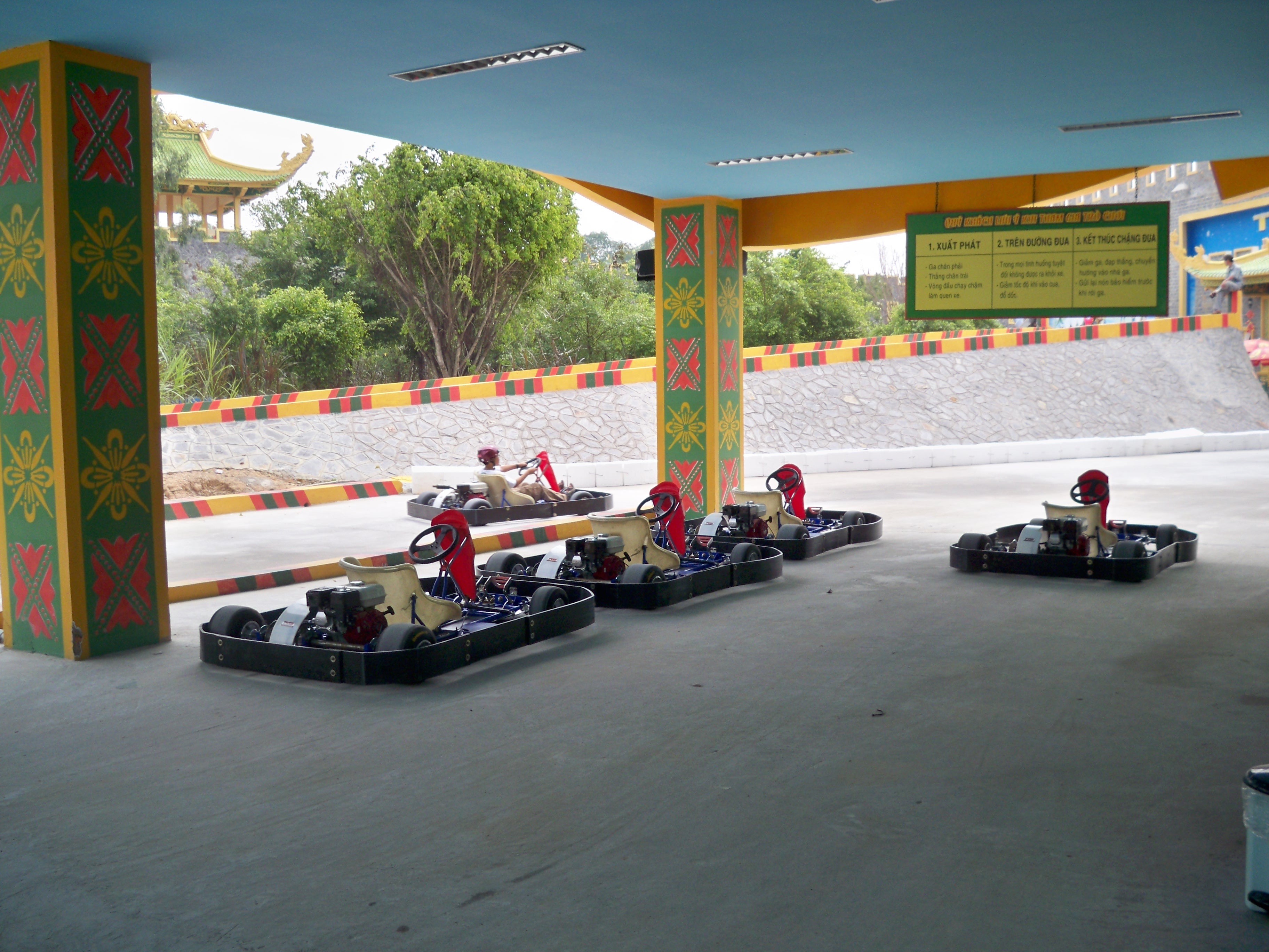 Đại Nam 1